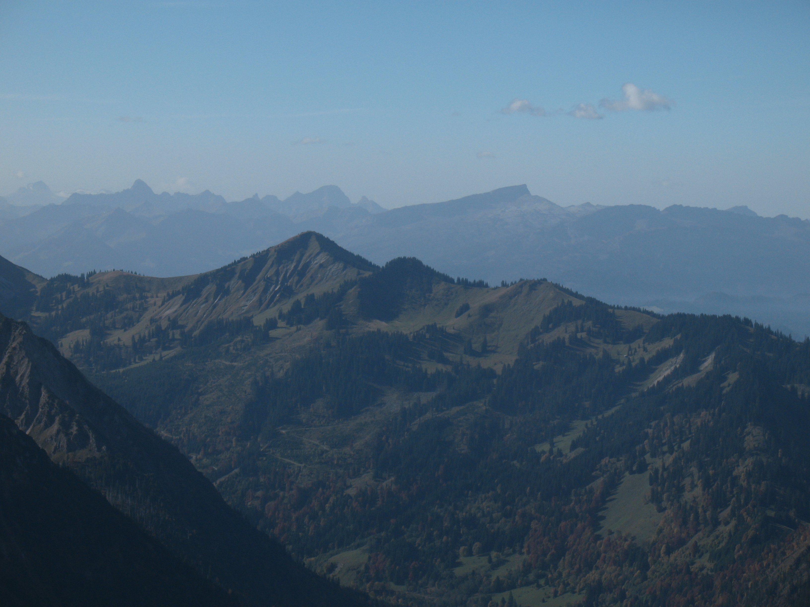 Blick vom Iseler (1876 m) auf den Schnippenkopf (1833 m) mit Heidelbeerkopf (1767 m).